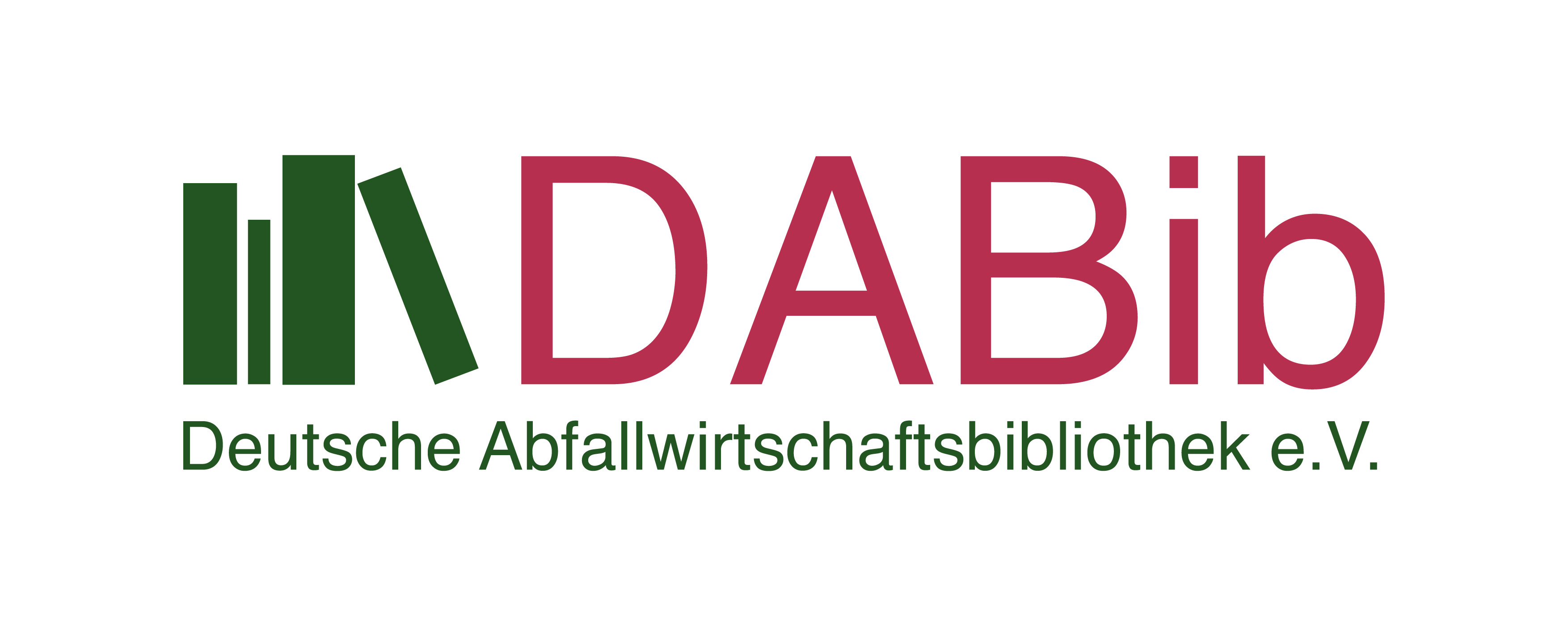 Logo der Deutschen Abfallwirtschaftsbibliothek